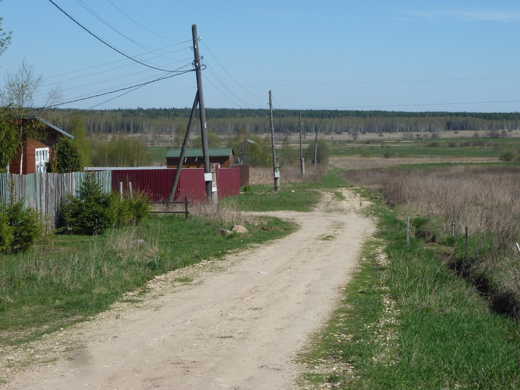 Деревня Бухолово , вид ввиз деревни